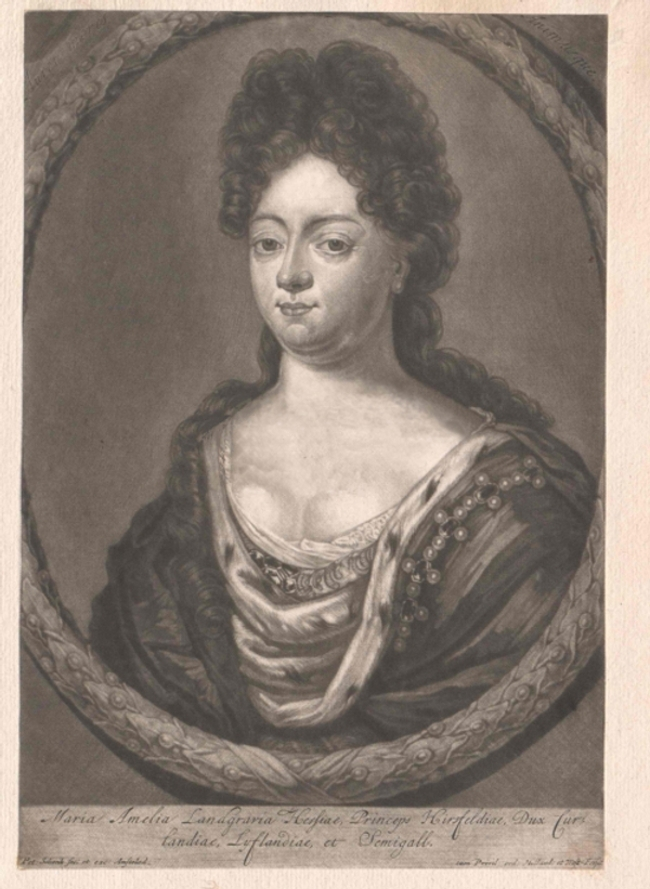 Maria Amália da Curlândia (1653-1711)